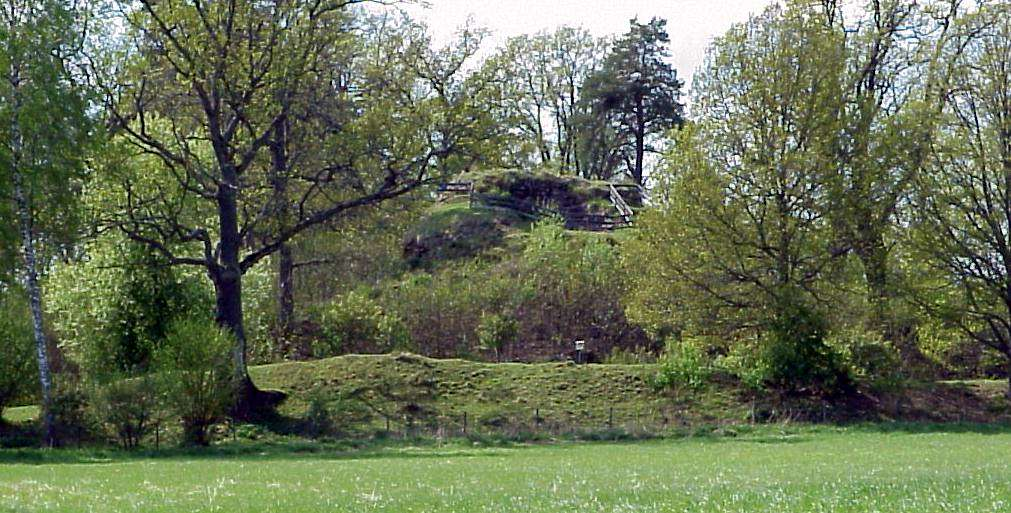 Svaneholms borgruin, Östergötland